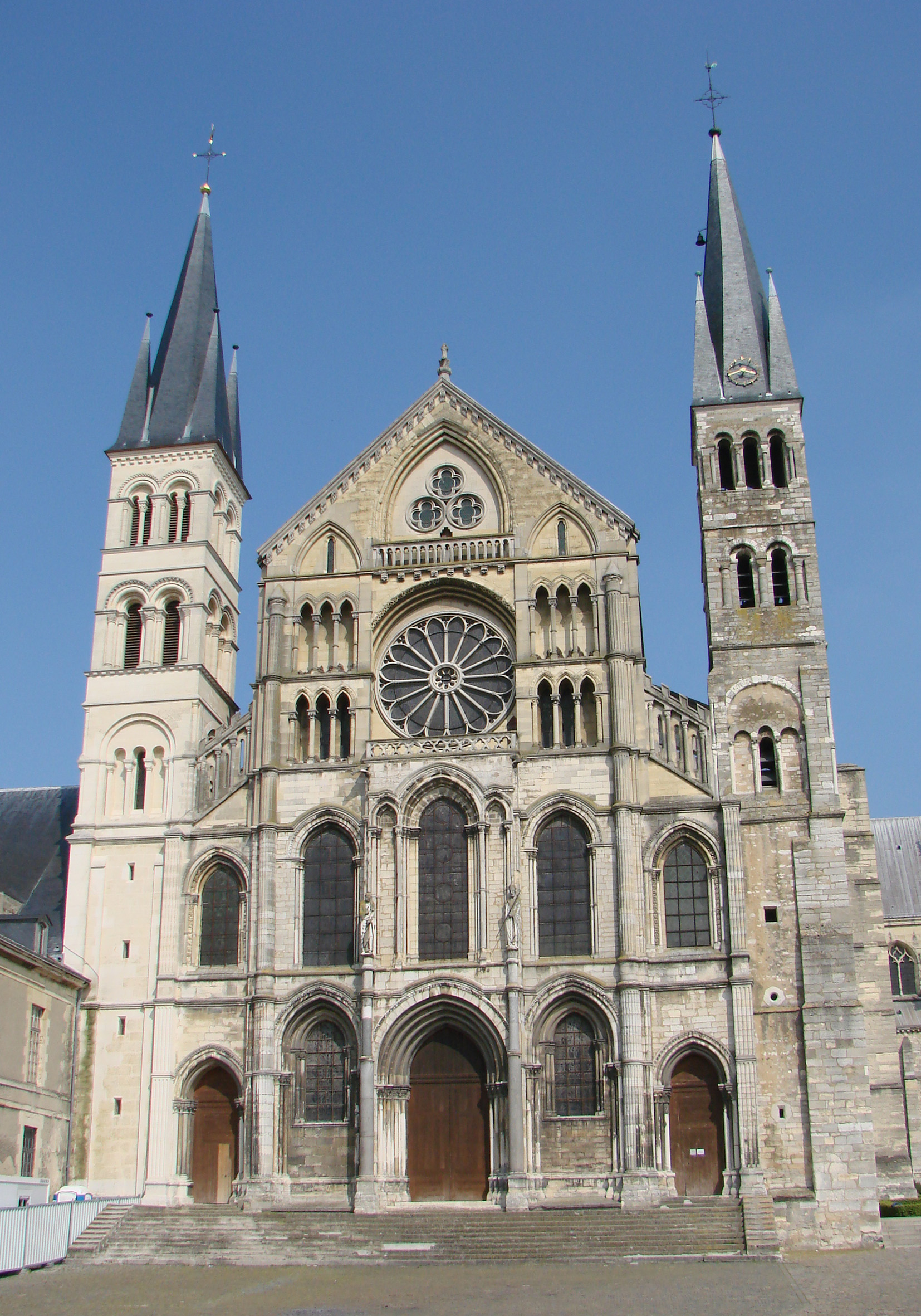 (Remplacé par une meilleure version)